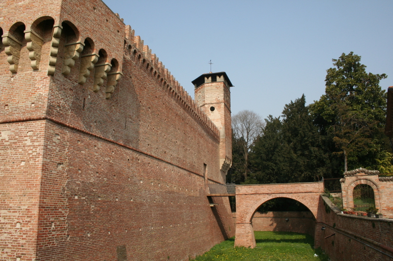 Urgnano, Castello Visconteo eretto nel 1394 dal vescovo Giovanni Visconti, passato nel 1465 a Bartolomeo Colleoni.